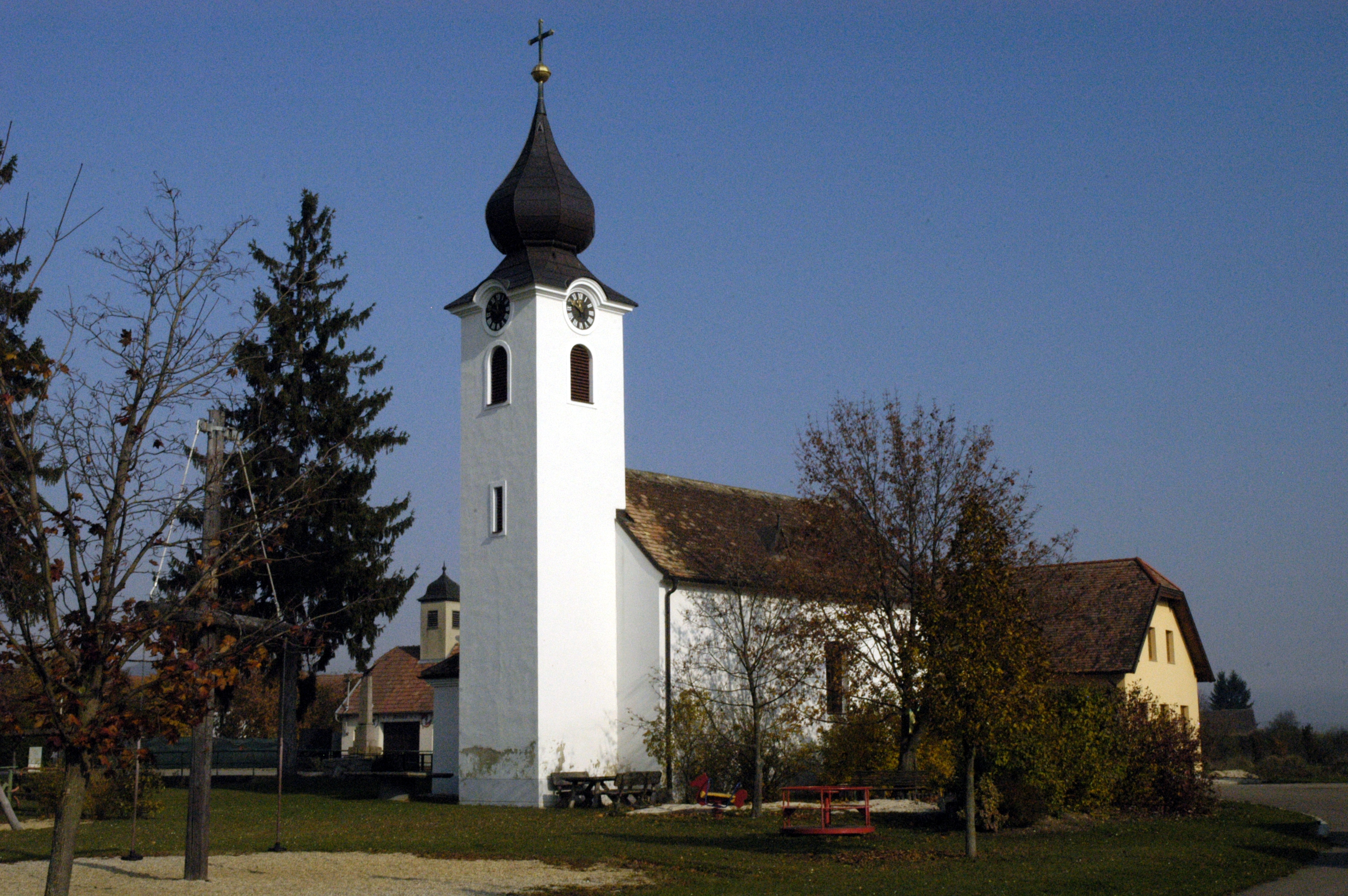 Ortskapelle heiliger Bartholomäus in Altenmarkt im Thale, Gemeinde Hollabrunn